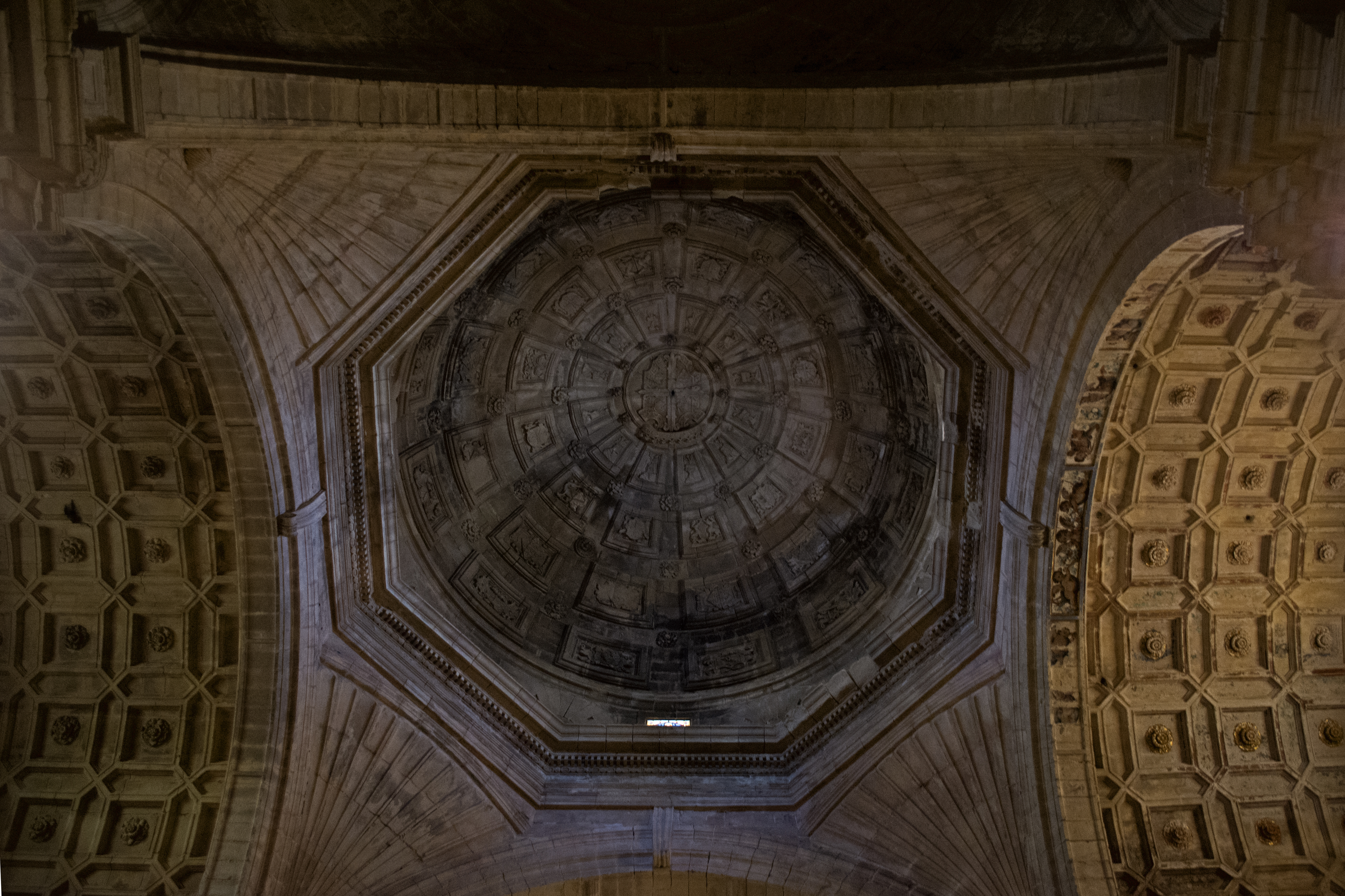 Interior de la iglesia de Santo Domingo de Sanlúcar de Barrameda.